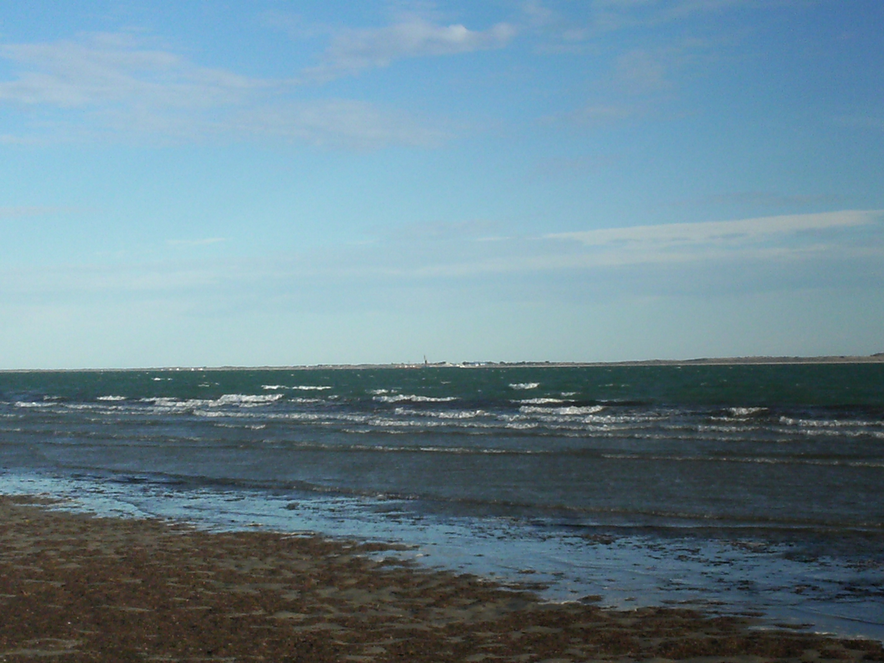 playa en frente al poblado de san antonio este